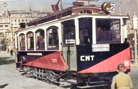 Un tramway repeint aux couleurs de la CNT à Barcelone en 1936.